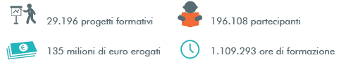 Forma.Temp